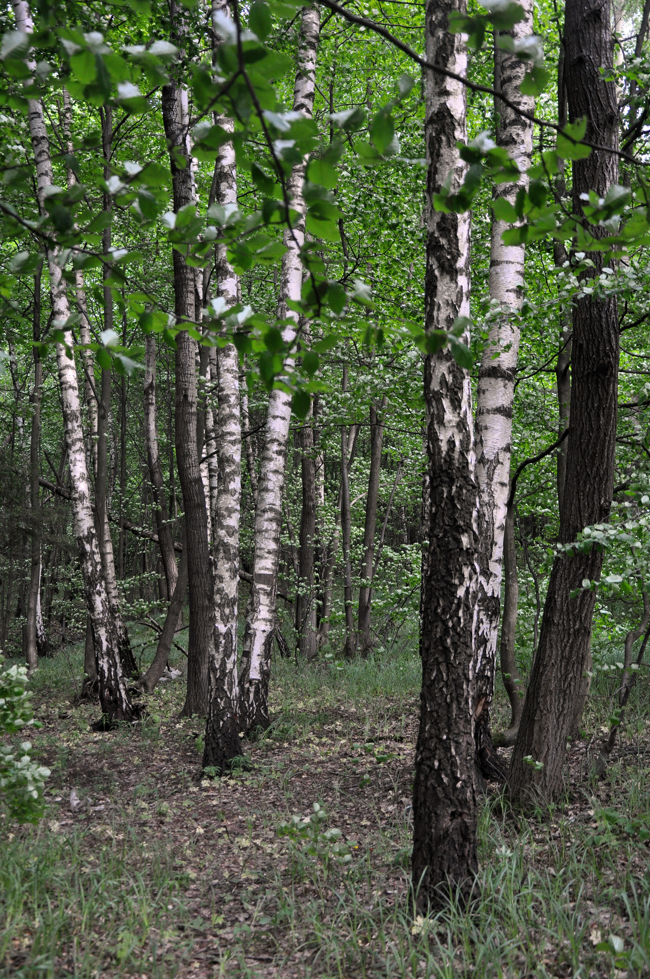 Березовий гай, Стрийський р-н, Лотатницьке л-во, кв. 27, 28